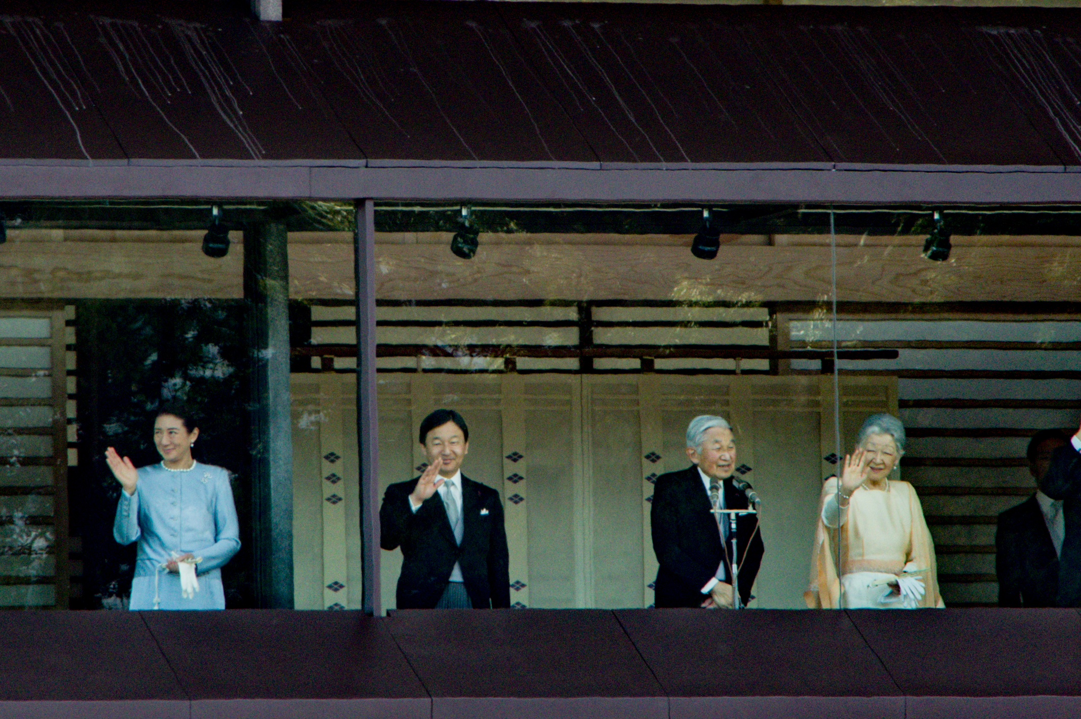 2016年新年一般参賀_20